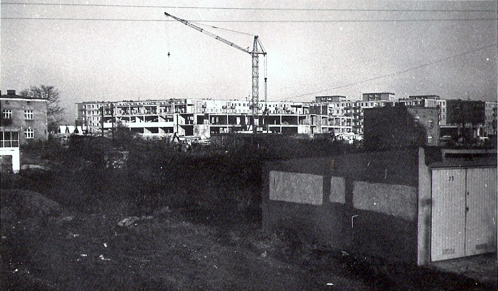 Budowa szkoły na os. Winiary w Poznaniu - 18.11.1989r.